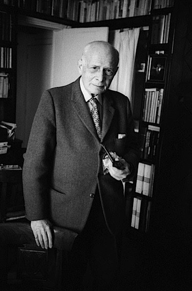 Jacques-Benoist-Mechin